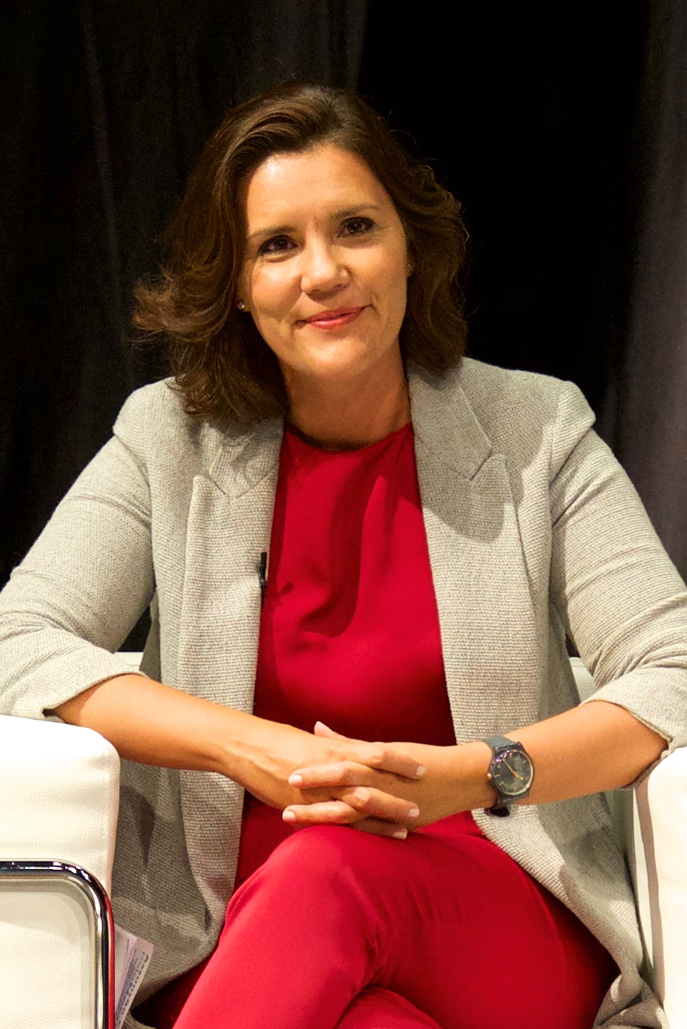 Assunção Cristas em entrevista televisiva